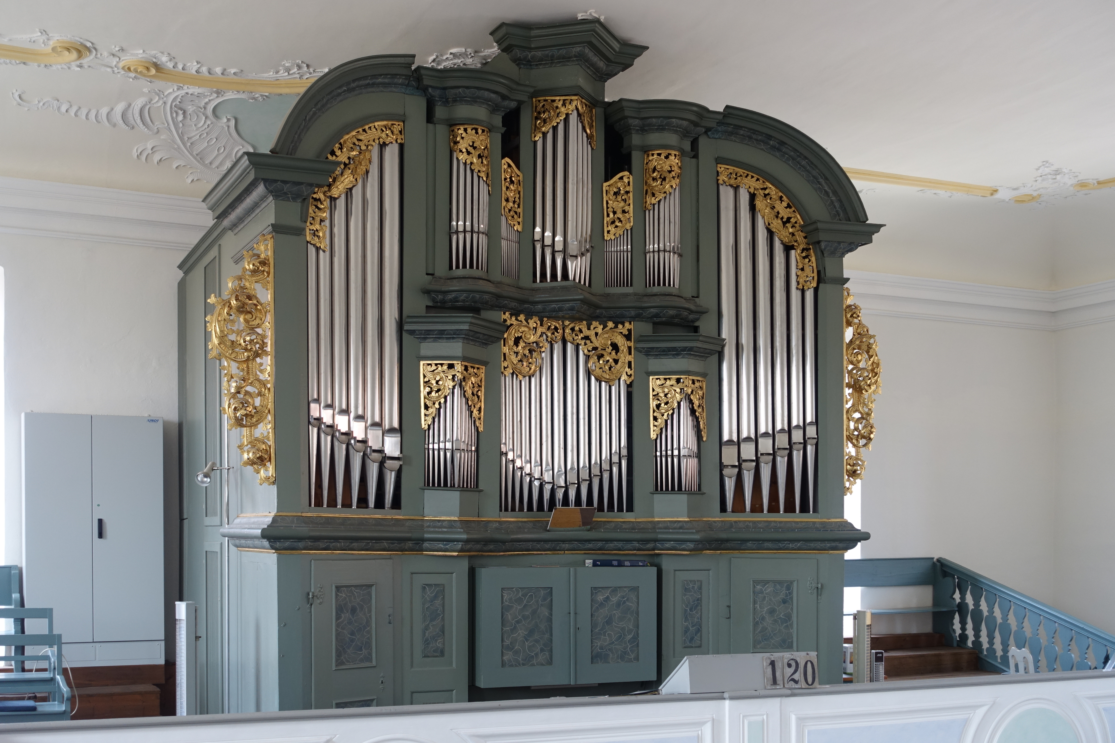 Orgel von 1858, gebaut von Michael Schmidt aus Schmiedefeld